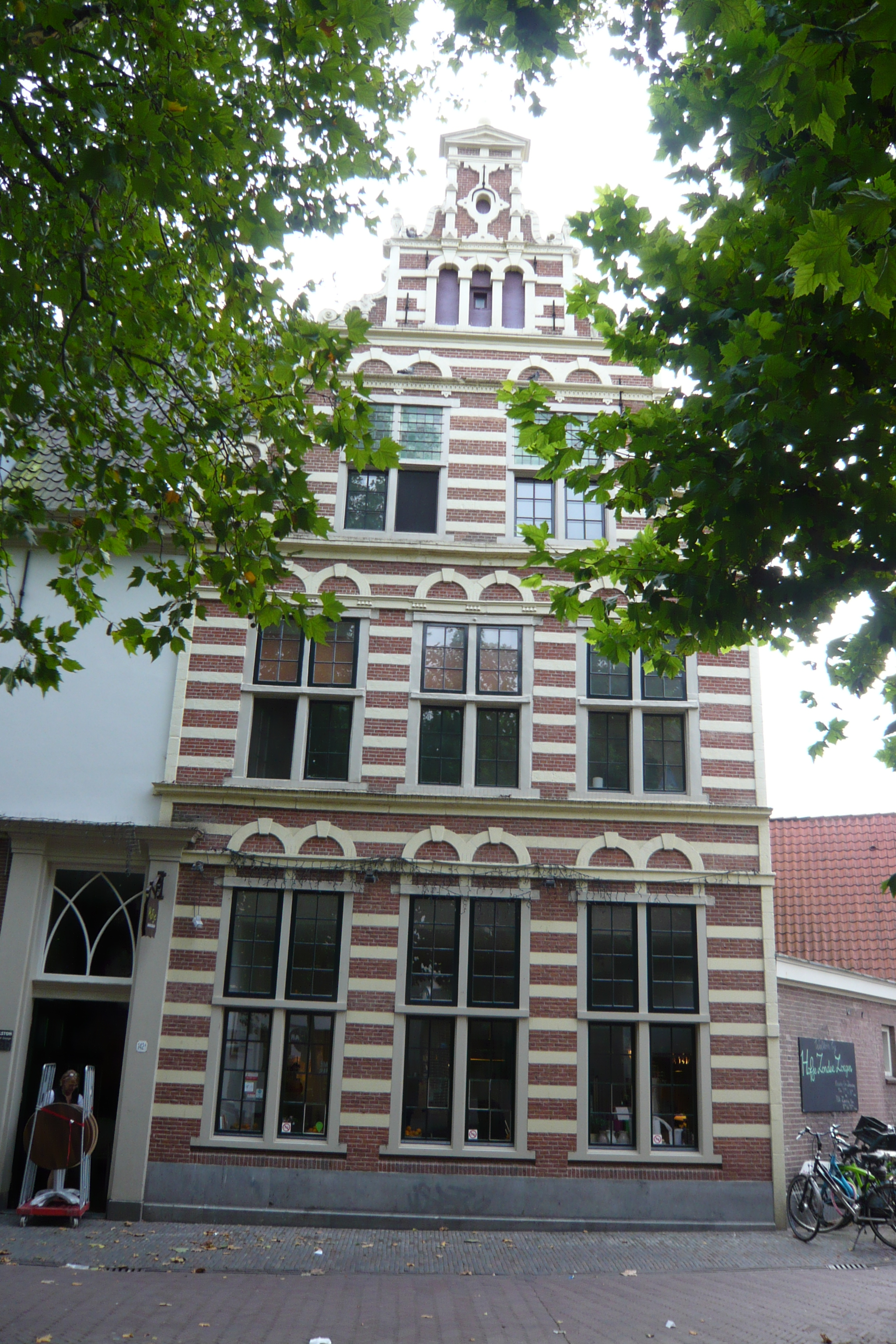 Grote Houtstraat, Haarlem St. Jorisdoelen (Proveniershof)